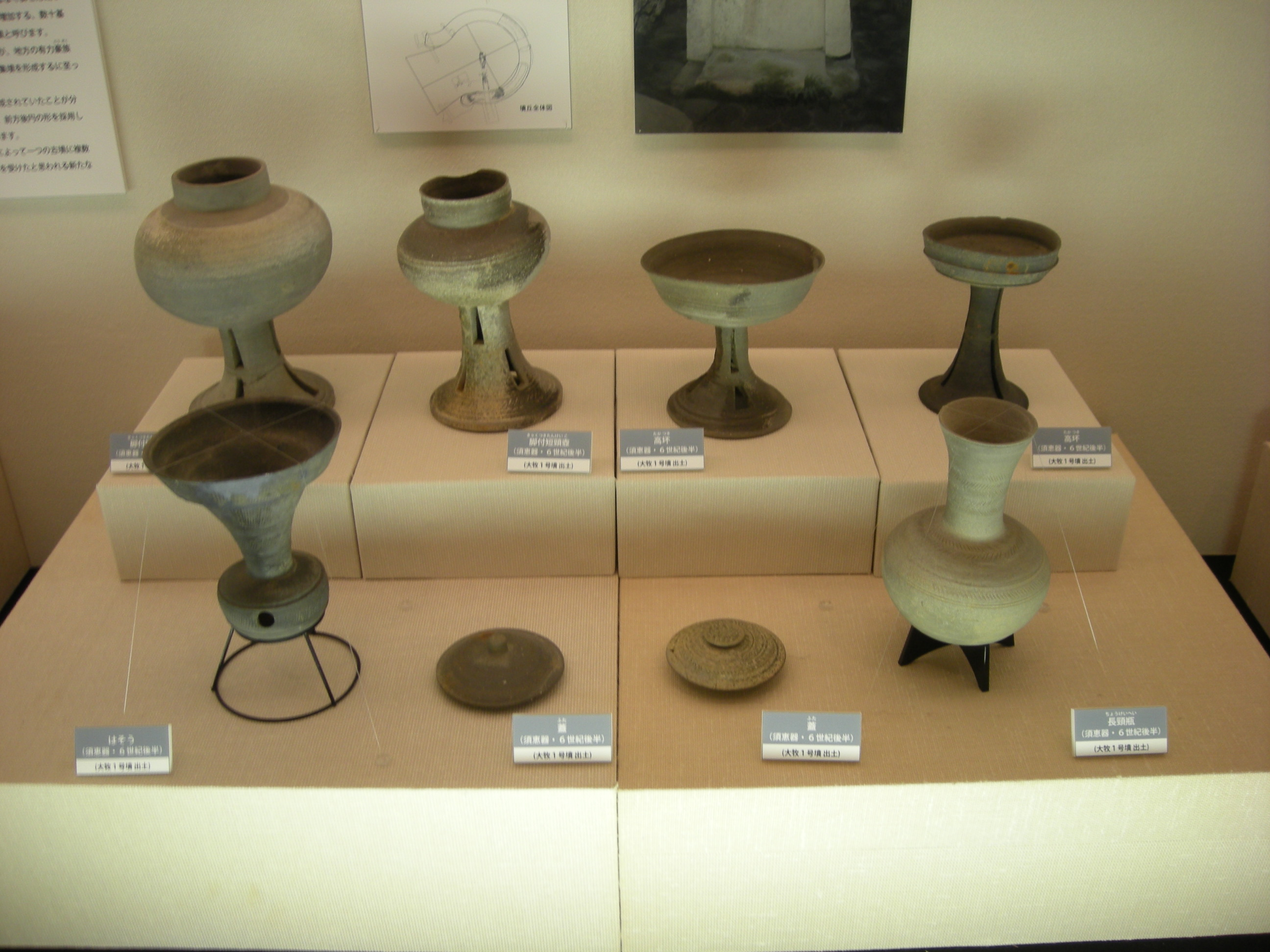 oumakiichigoukohun-3（大牧1号古墳）